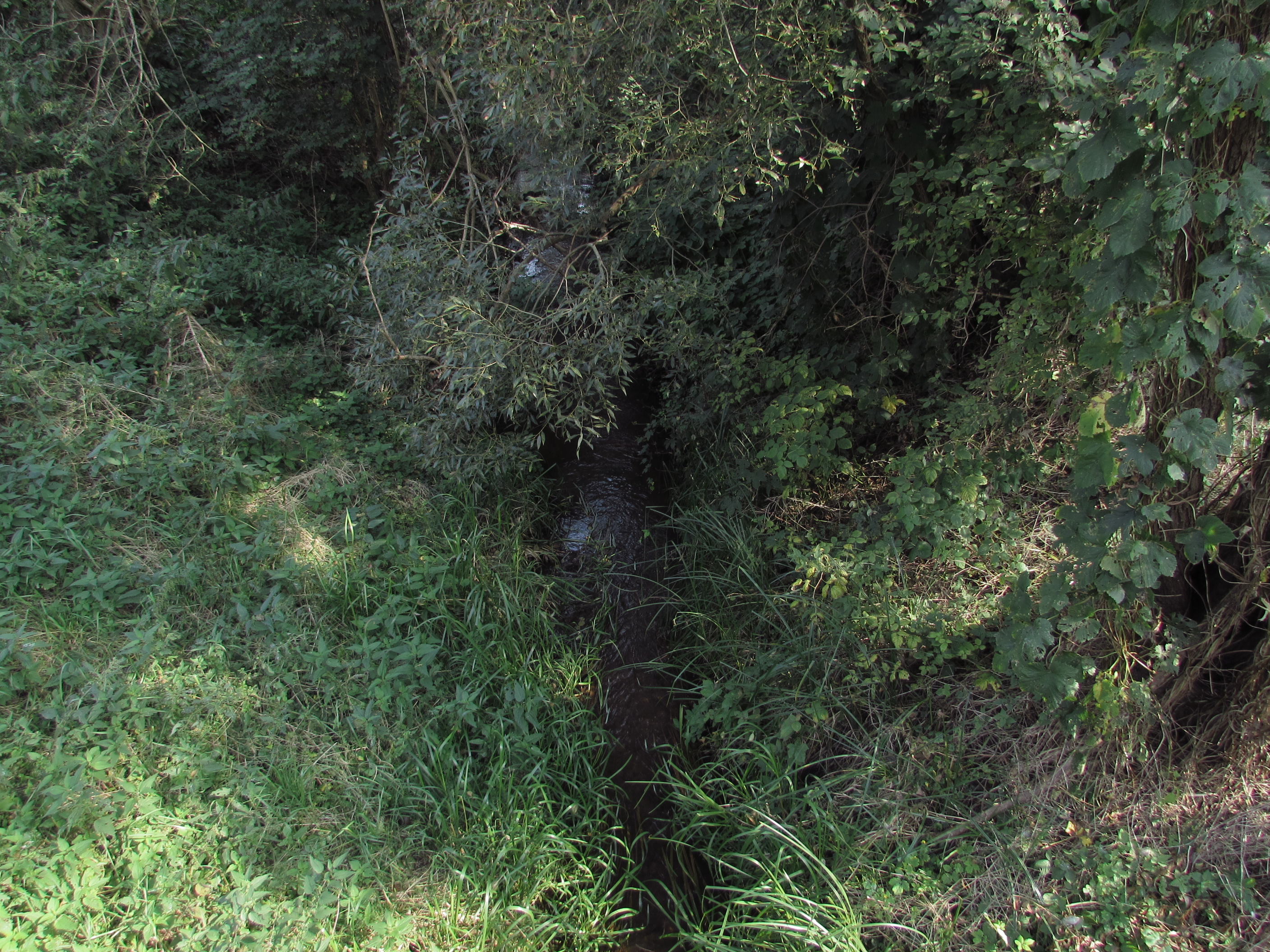 Der Geuenbach bei Köpernitz